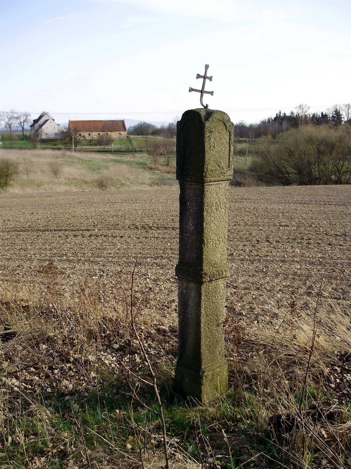 Marterl bei Hartessenreuth aus dem Jahre 1850.